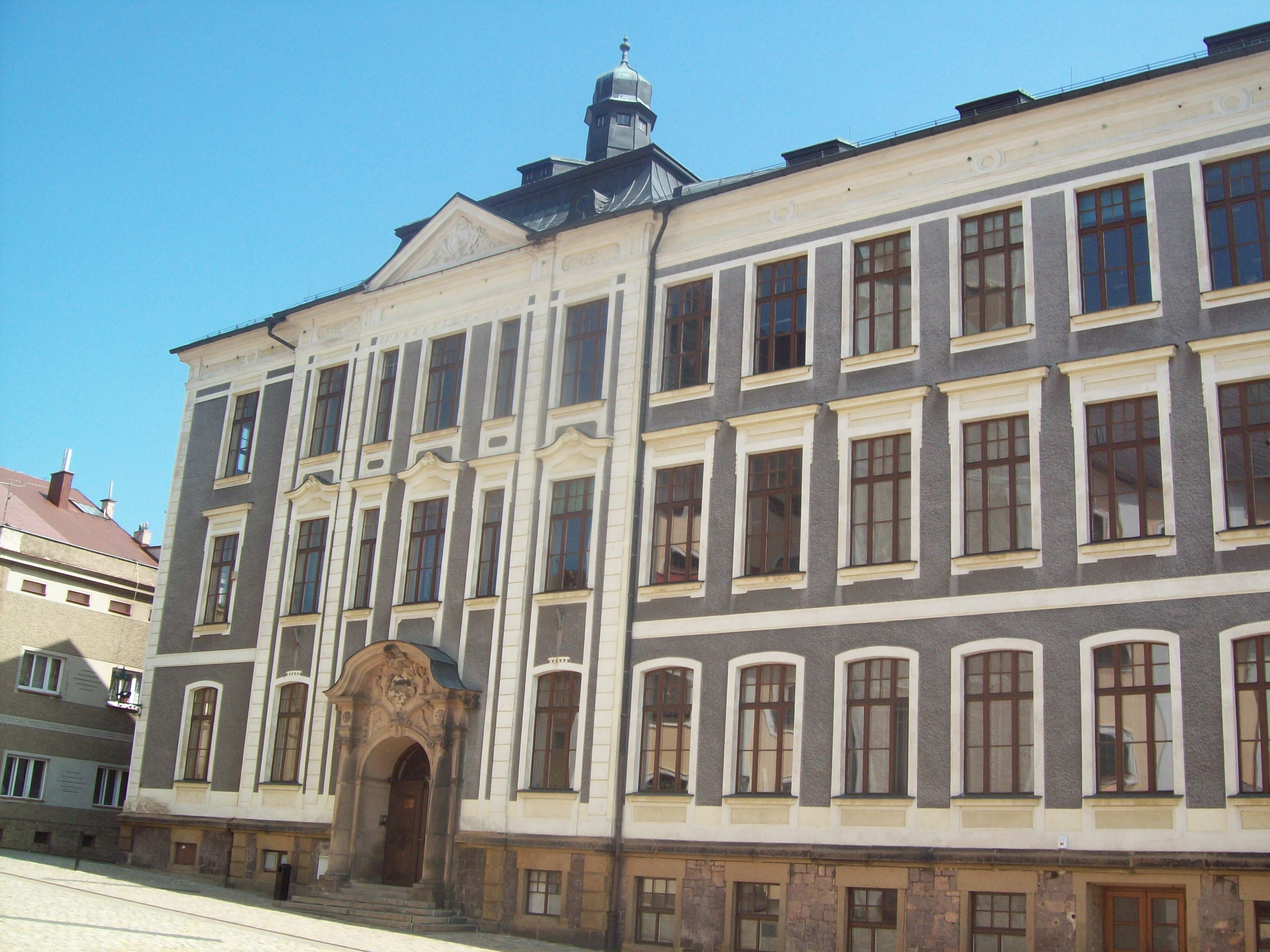 Gymnázium Broumov, Hradební 218, 550 01 Broumov.